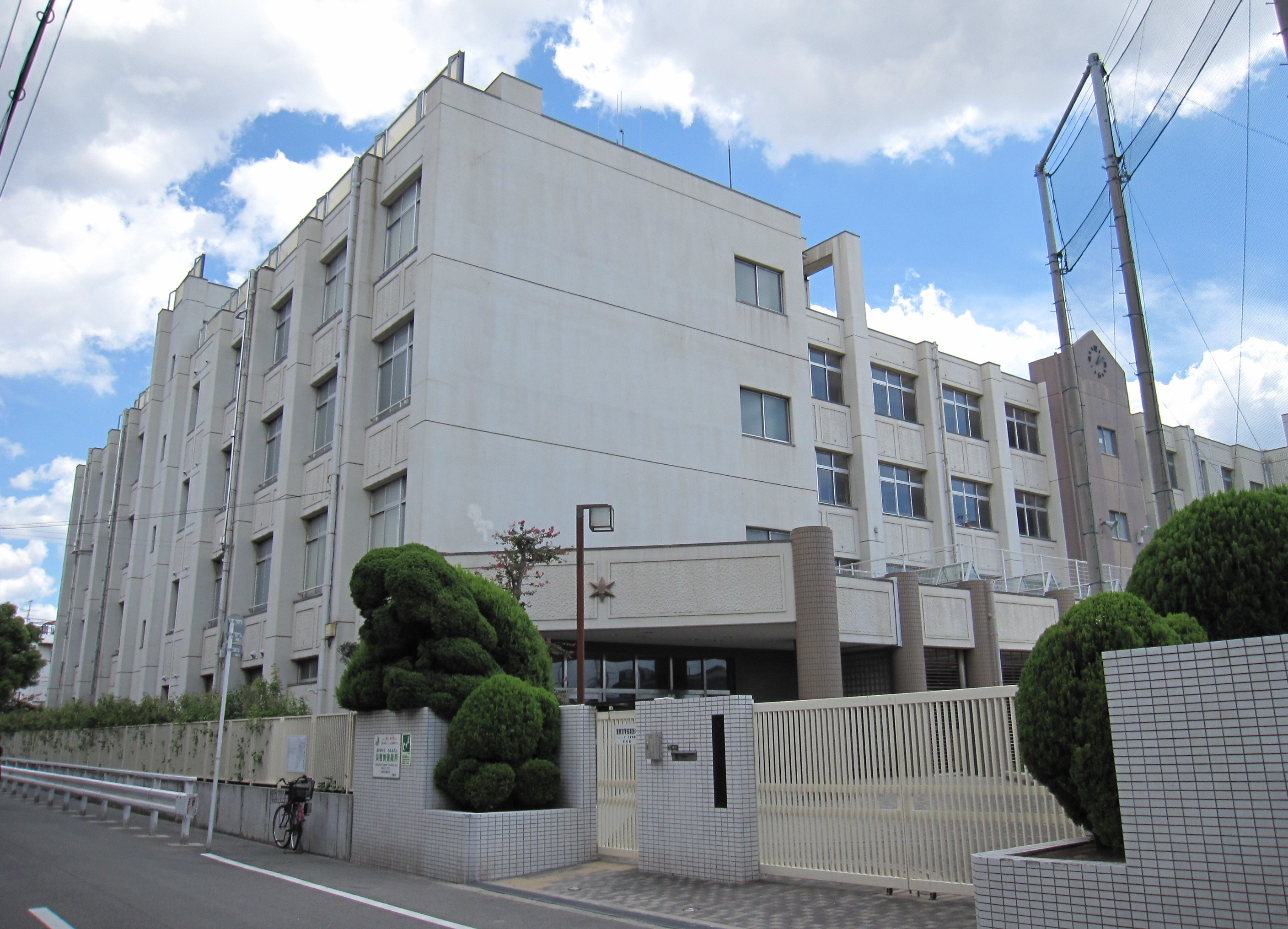 大阪市立大正西中学校